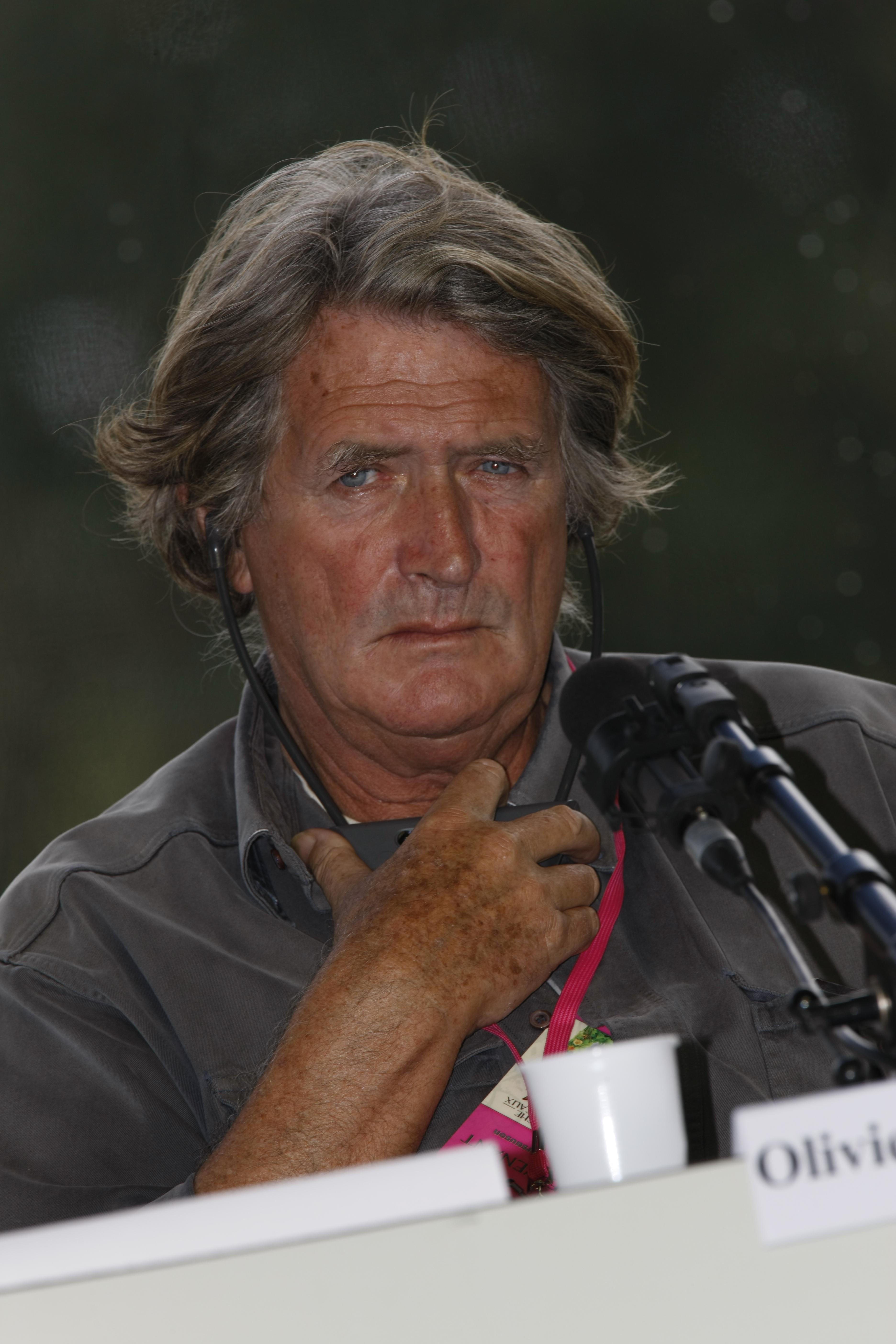 Olivier de Kersauson - Université d'été du MEDEF